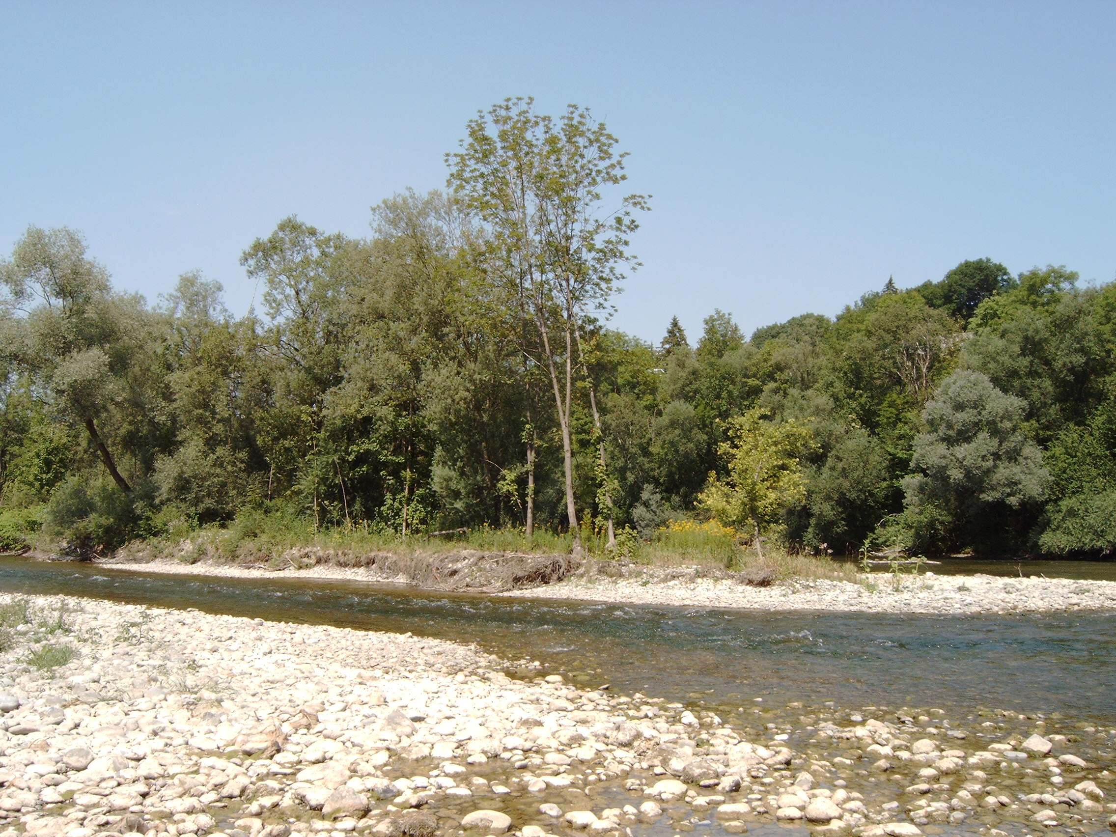 Insel im Lech bei Sandau/Island in the river Lech